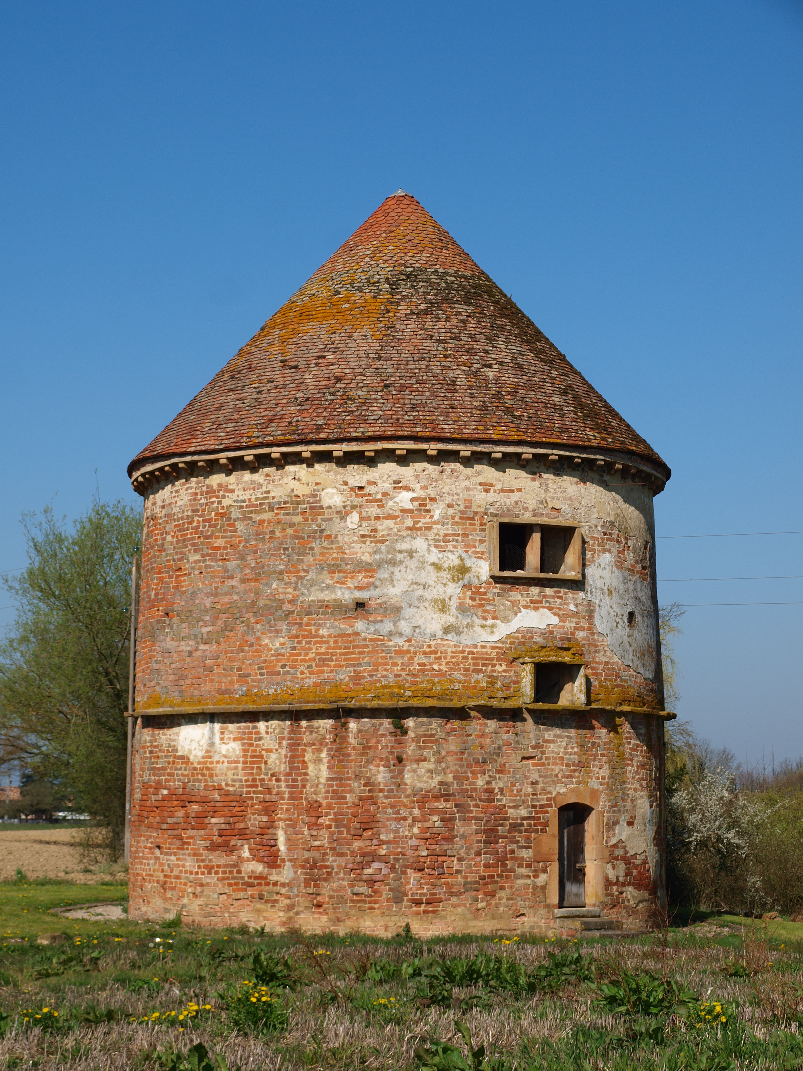 Perrex (Ain, France)